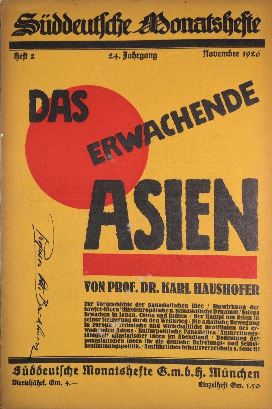 Das erwachende Asien. Von Prof. Dr. Karl Haushofer, Süddeutsche Monatshefte, Heft 2, November 1926